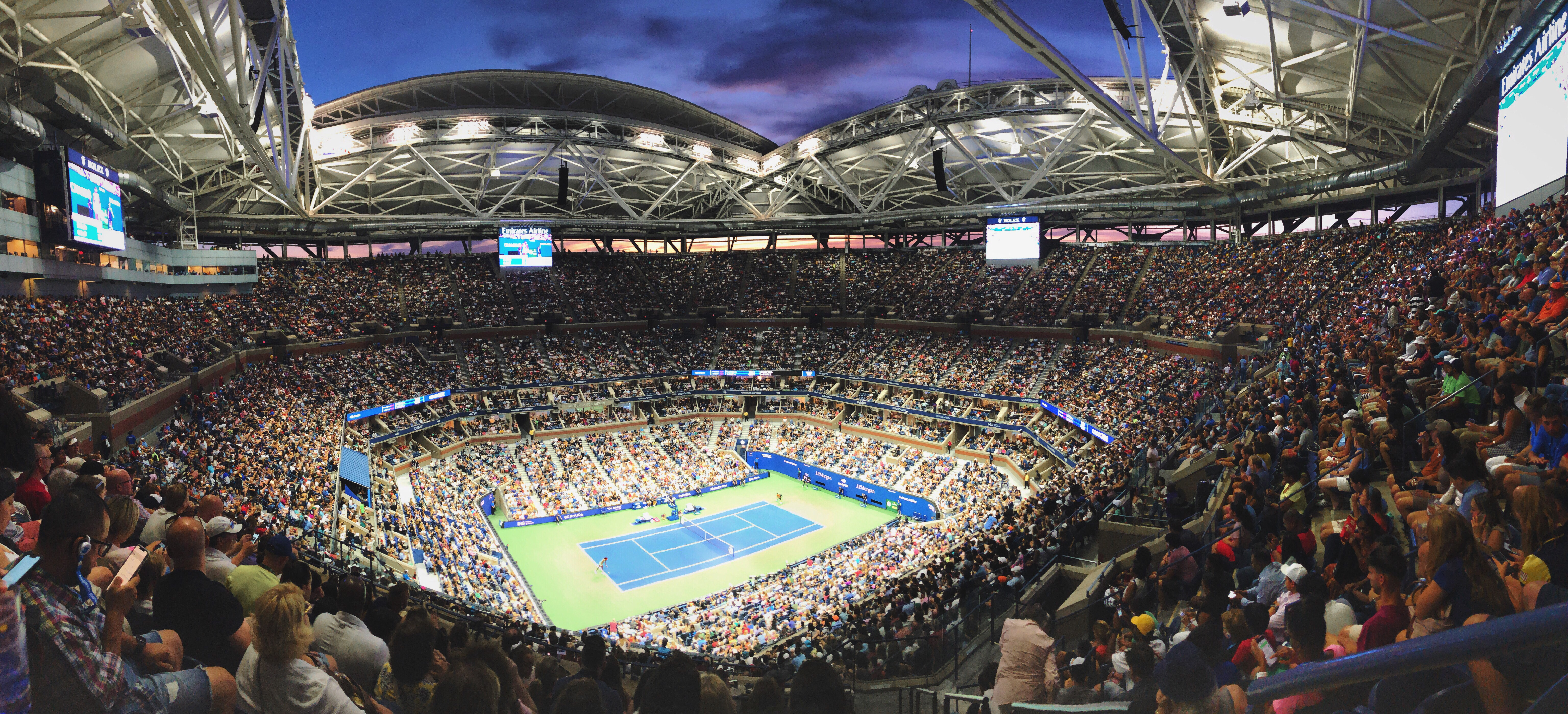 womenworthwatching Osaka vs Coco, US Open 2019